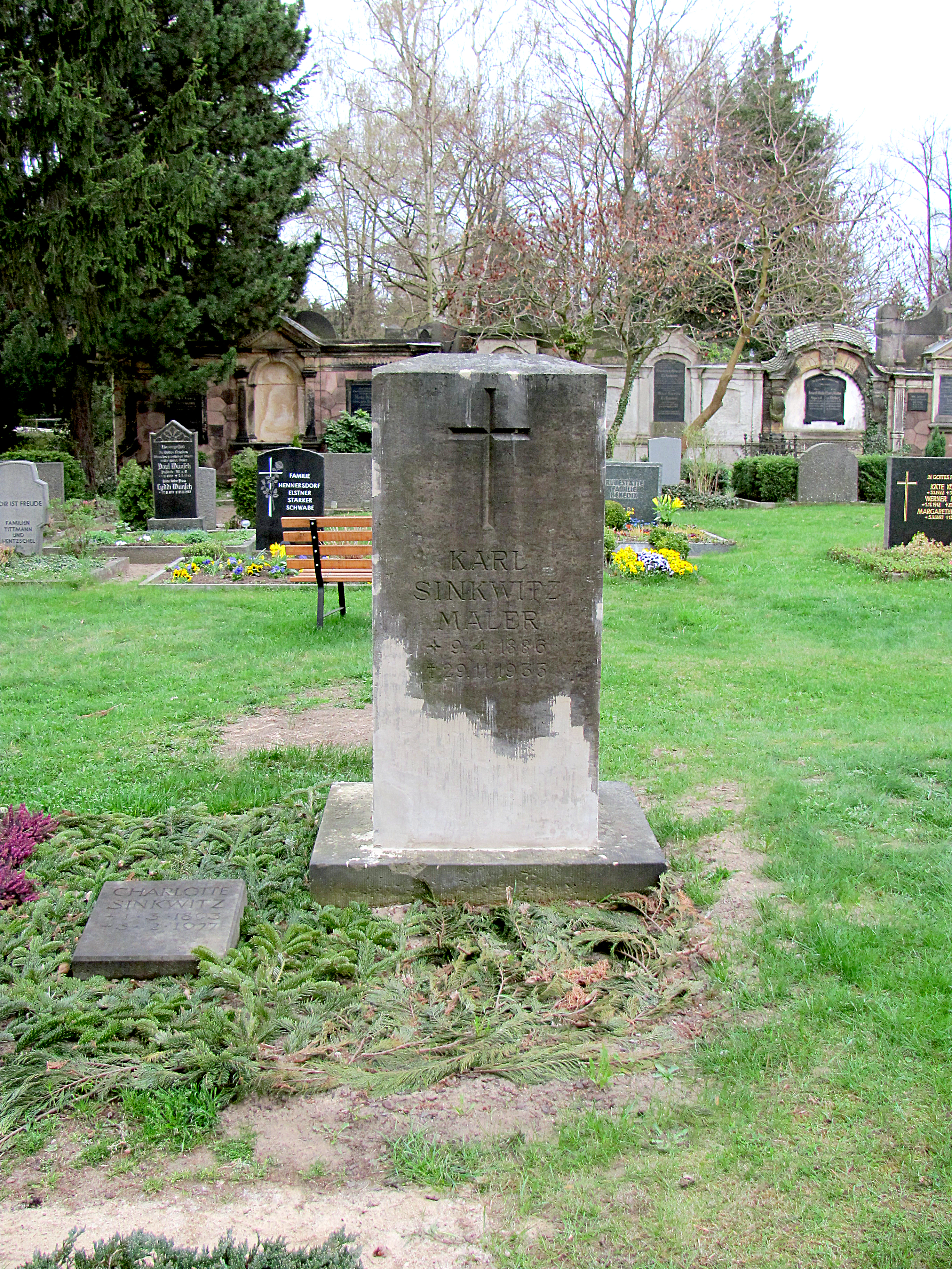 Karl Sinkwitz: Grabmal in Radebeul auf dem Friedhof Radebeul-West